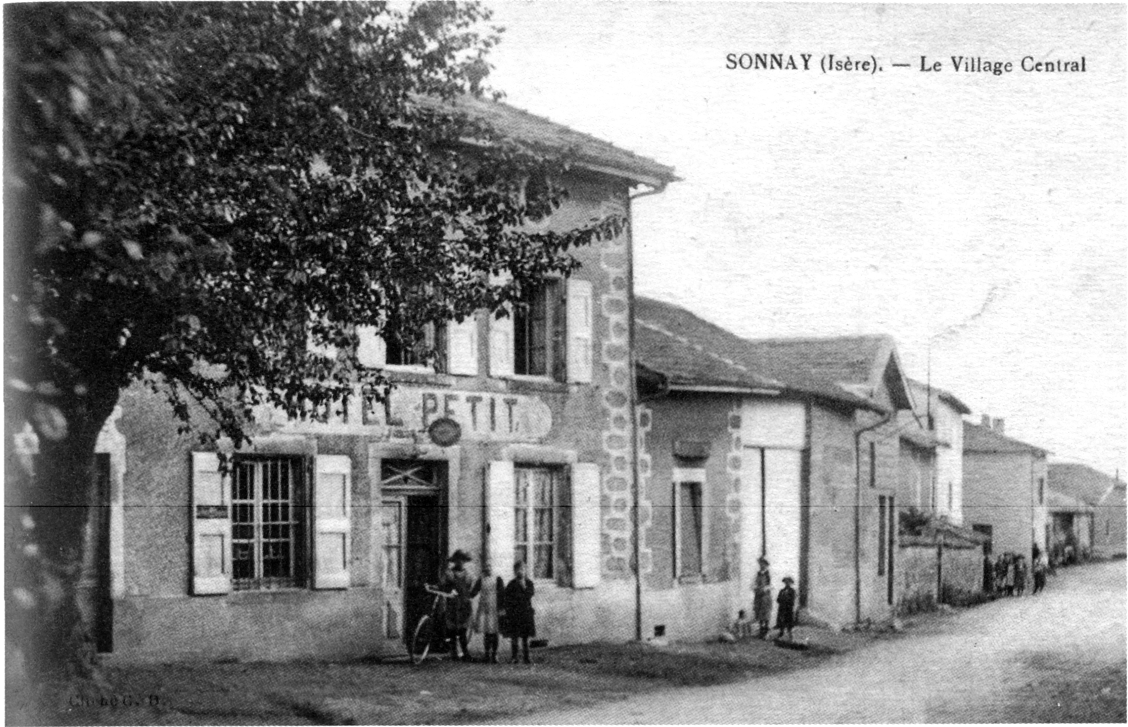 Sonnay, le village central, en 1910